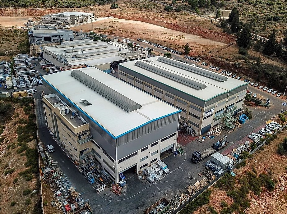 מפעלי קבוצת טרלידור